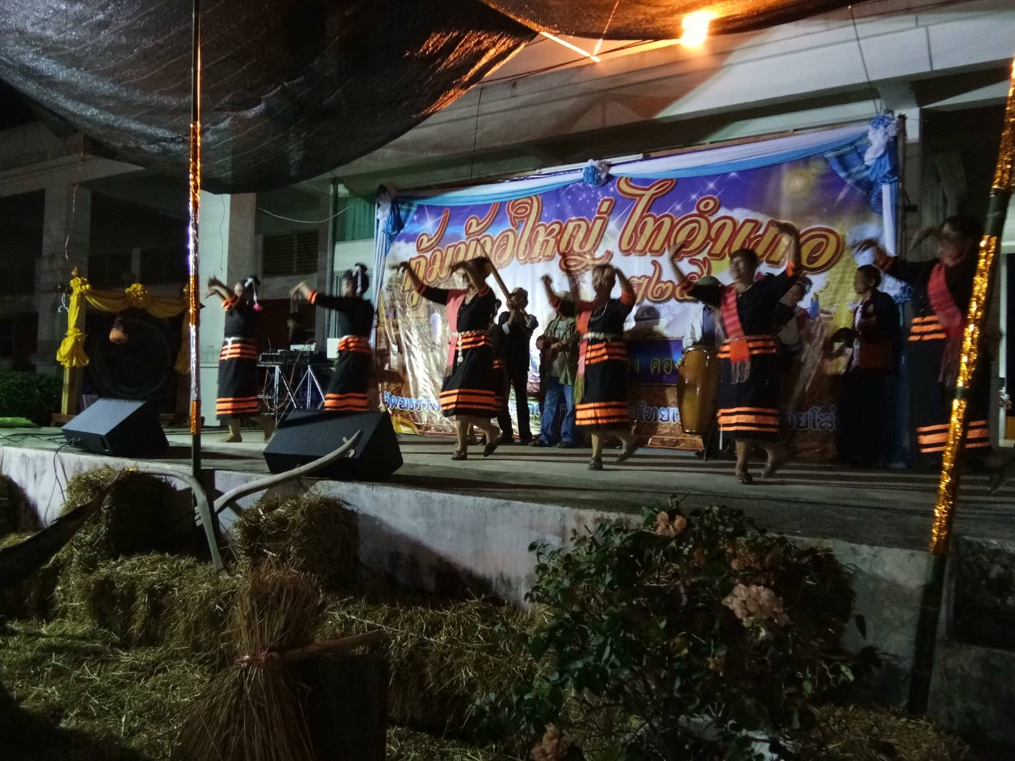 เป็นการละเล่นดนตรีพื้นเมืองอีสาน (พิณ และ แคณ )ประกอบการฟ้อนรำของ บรรดา หญิงสาวและหนุ่มๆในอำเภอ ที่มาร่วมงานบุญในคำคืนนั้น